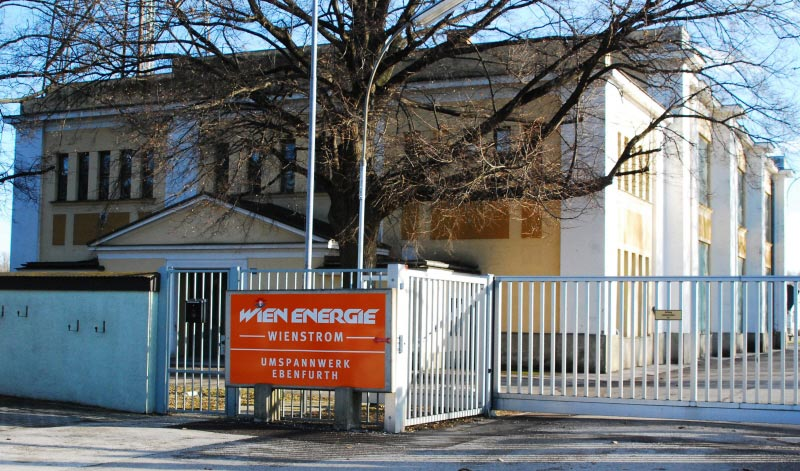 Das Umspannwerk Ebenfurth von WienStrom in Ebenfurth (Niederösterrreich)